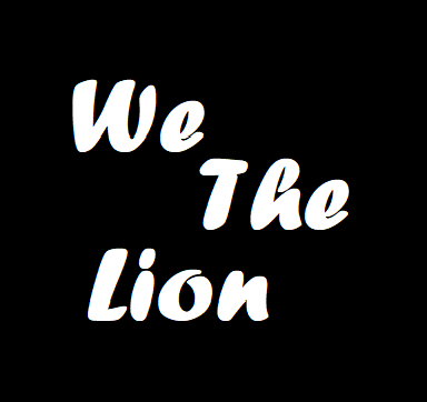 We The Lion logo banda peruana.